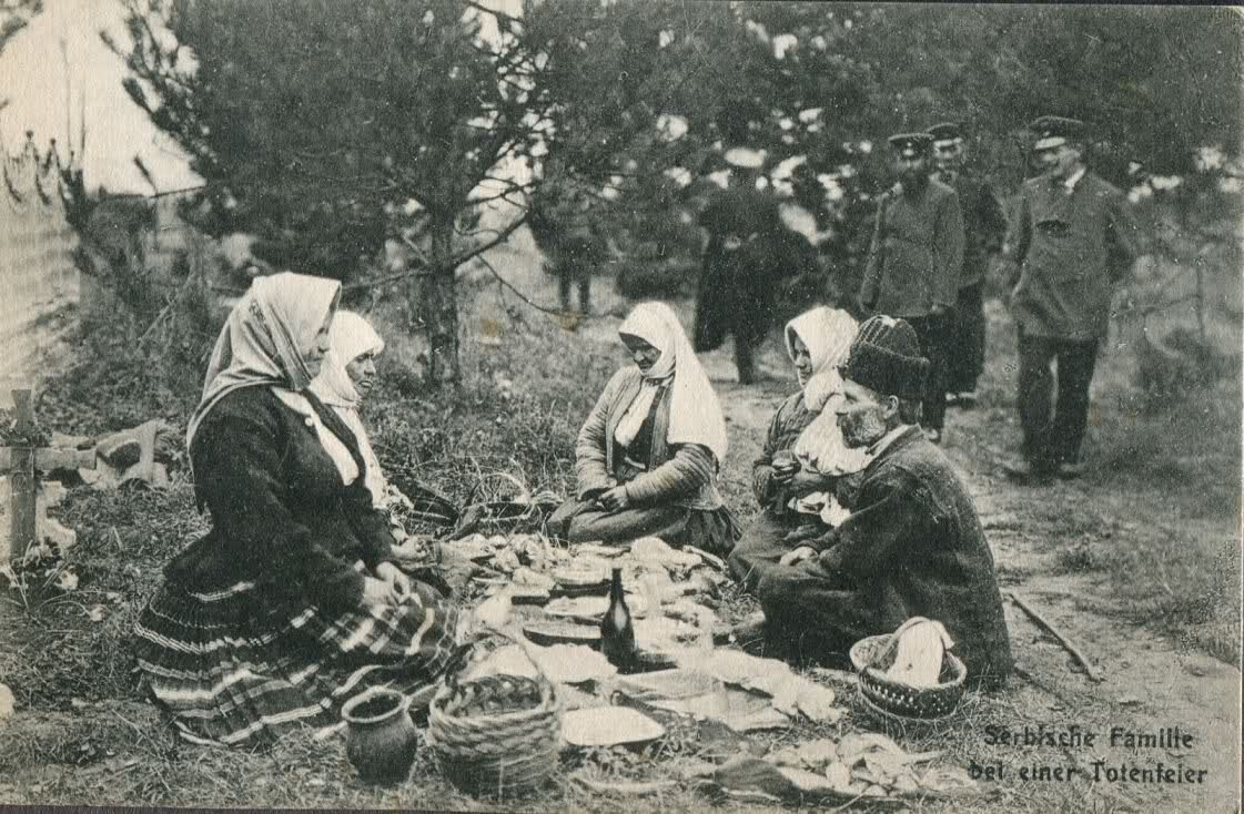 Поминки (Задушнице) в Сербии. Между 1914 и 1918 годами.